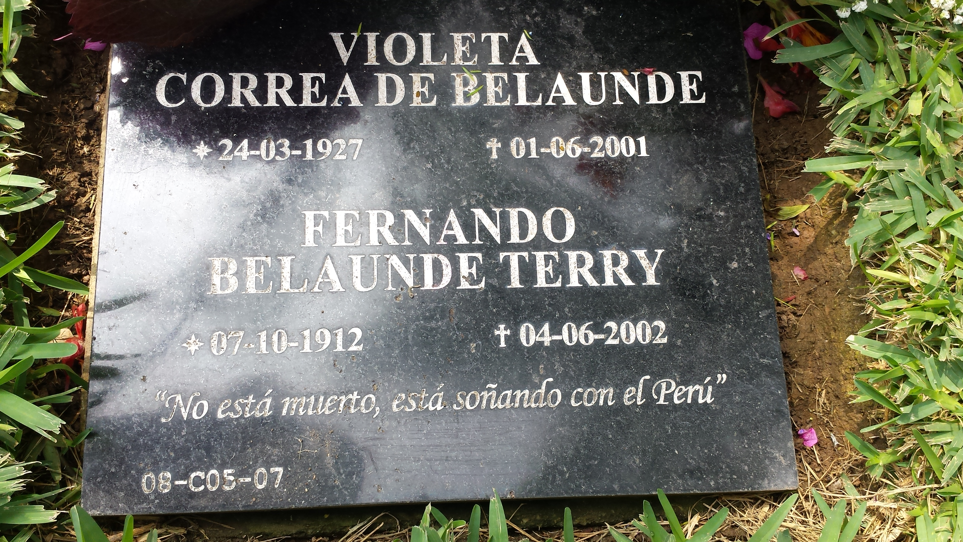 Tumba de Fernando Belaunde Terry , es ubicado en el Cementerio Campo fe en Huachipa.(Lima este)